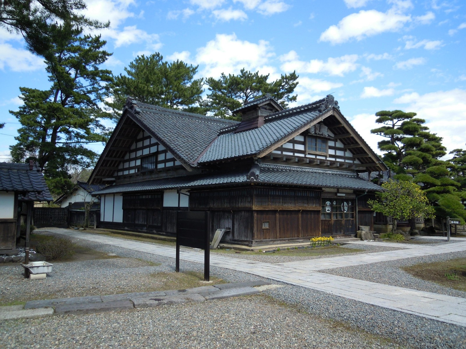 山形県飽海郡遊佐町にある旧青山本邸の母屋